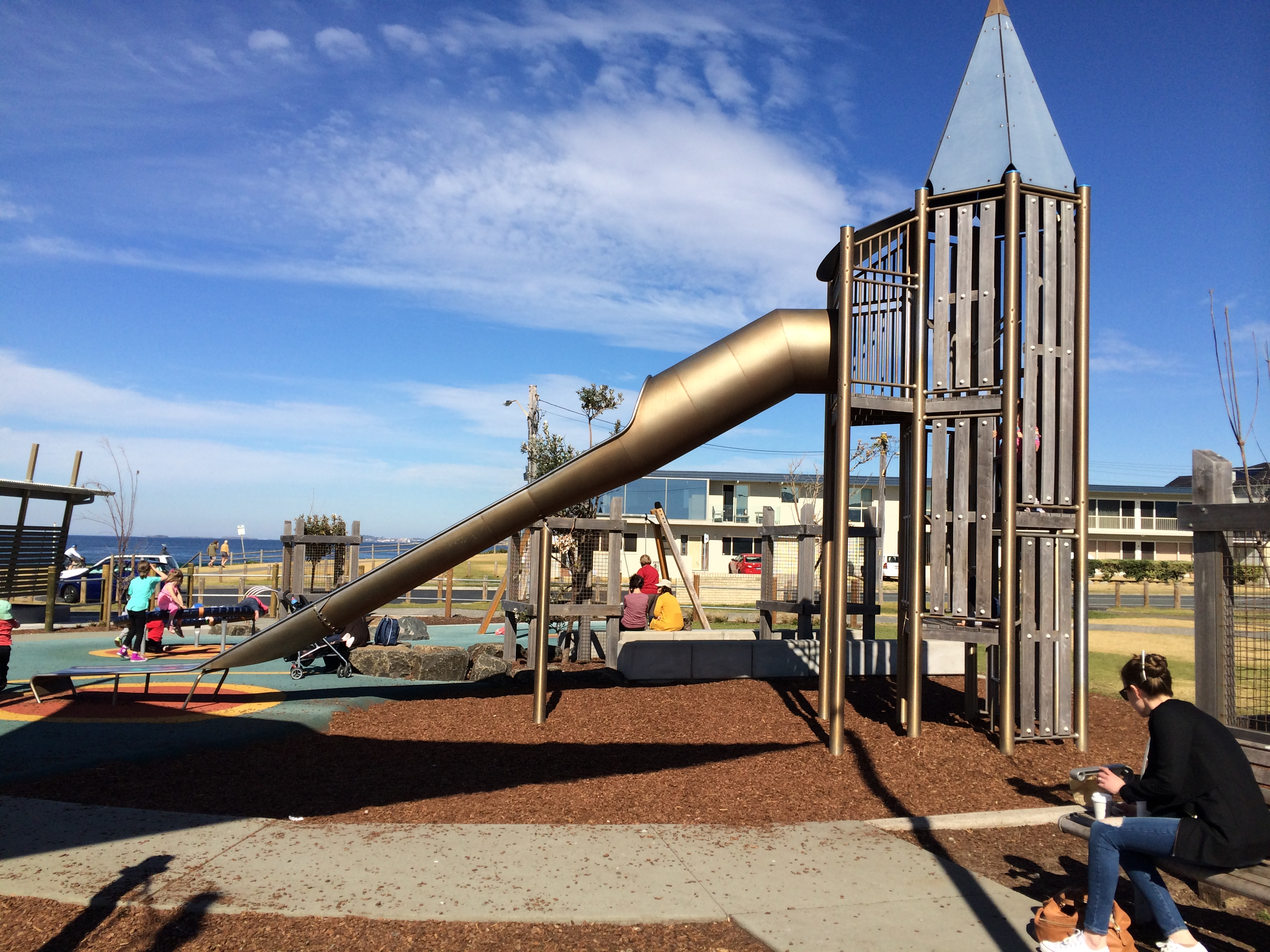 Дитячий майданчик у Товраджі Парку, Товраджі, Новий Південний Уельс, Австралія